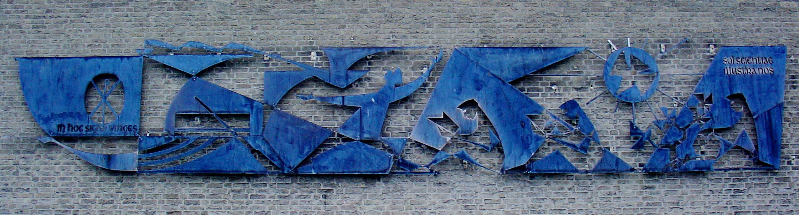 Titel kunstwerk: In Hocv signe vincis (staal, reliëf, 1961) door Krijn van Dijke - Heemskerkstraat Gouda. Bron:Helpwandkunstopsporen